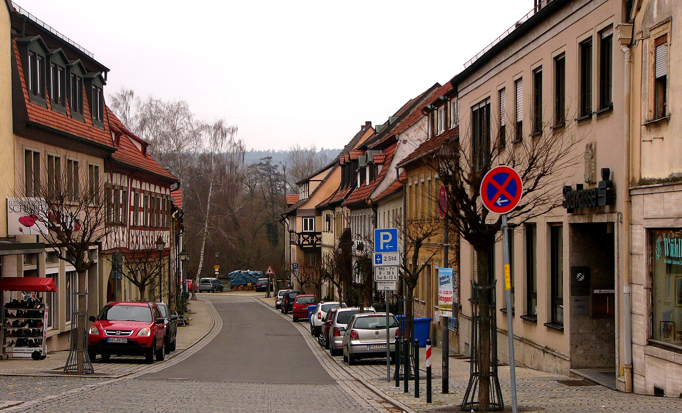 Ensemble Mainstraße Eltmann. Die ackerbürgerlichen Anwesen an der Mainstraße bilden ein Stadtquartier mit weitgehend einheitlichem biedermeierlichem Erscheinungsbild der ersten Hälfte des 19. Jahrhunderts. Die im Kern meist älteren zweigeschossigen Gebäude prägen in geschlossener, traufseitiger Reihe den Straßenraum. Auf der Ostseite reichen die Dreiseithöfe bis zum ehemaligen Stadtmauerverlauf, wo ihre Scheunen unmittelbar aneinandergrenzen. Im Westen ist die rückwärtige Bebauung etwas heterogener. Die Mainstraße war bis zur Verschiebung der Mainbrücke, die bereits vor 1487 die Fährverbindung über den Fluss ersetzte, der Hauptzugang zur Stadt. Sie wird nach Süden geradlinig in der Schottenstraße weitergeführt und ist über den ansteigenden Steinertsplatz mit dem erhöht liegenden Marktplatz, dem Zentrum des unter Ludwig dem Bayern 1335 mit Stadtrechten ausgestatteten Ortes, verbunden. Umgrenzung: Mainstraße 1–16, Zinkenstraße 1, Brunnenstraße 2. Aktennummer: E-6-74-133-1. This is a photograph of an architectural monument.